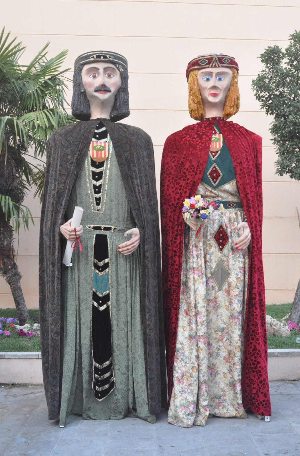 Els gegants vells d'Abrera, Ermengol i Montserrat, a la Festa Major d'Abrera (2019).